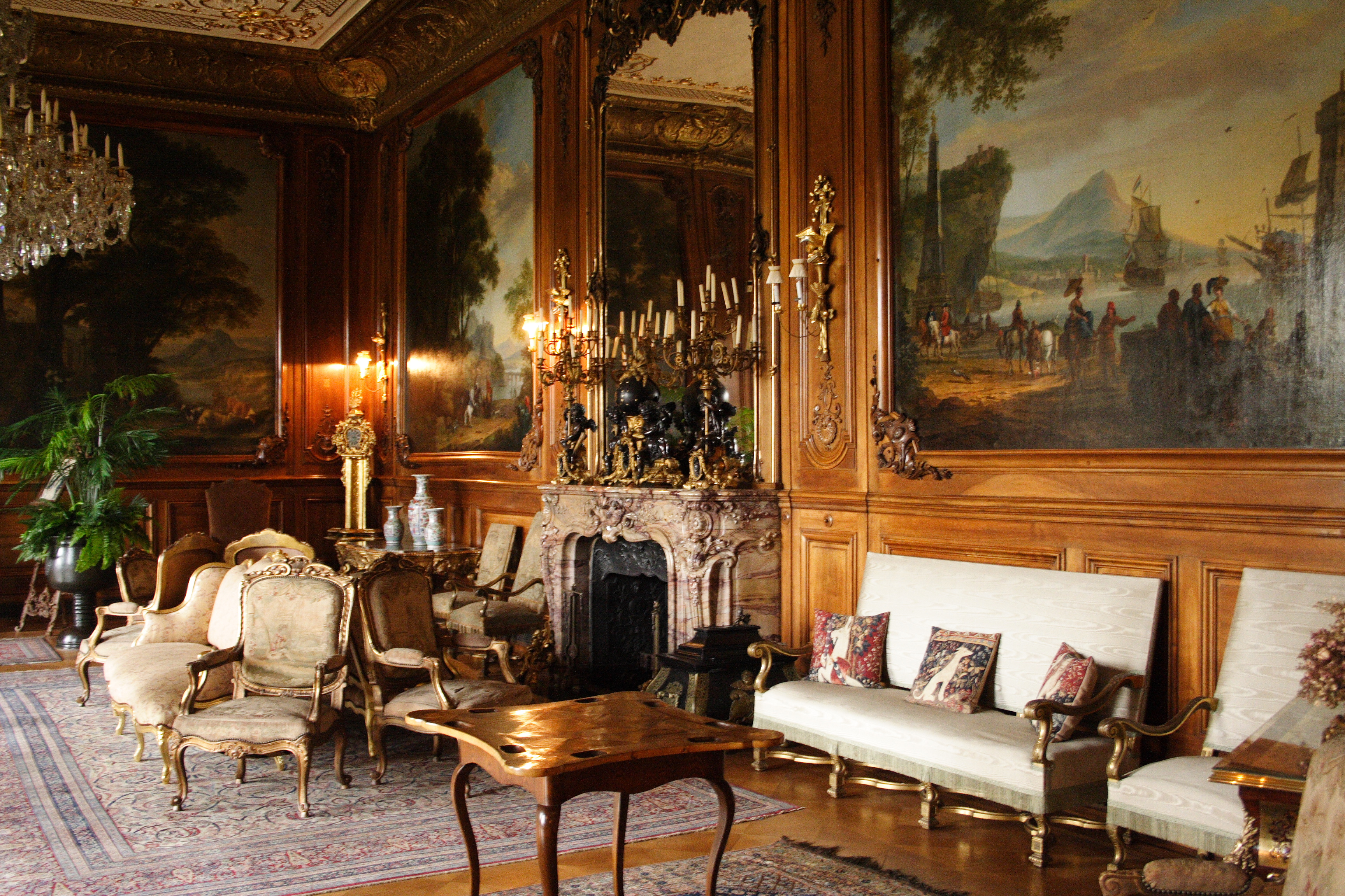 Pszczyna Castle Interior